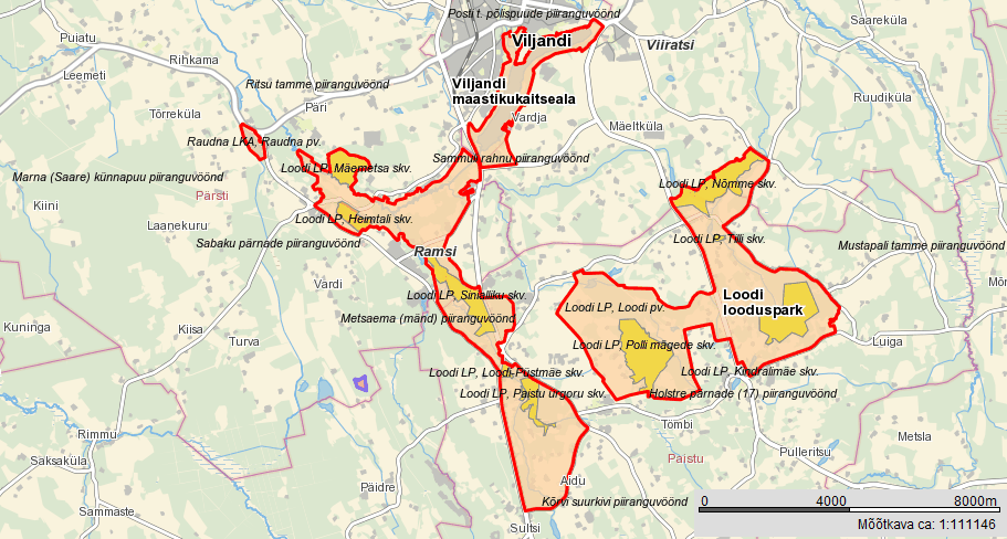 Loodi looduspark ja Viljandi maastikukaitseala Maa-ameti kaardil.